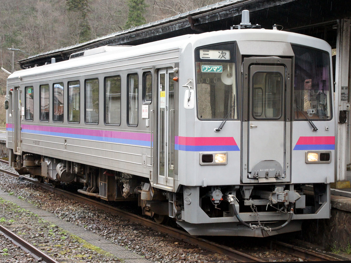 JR西日本キハ120形（芸備線）